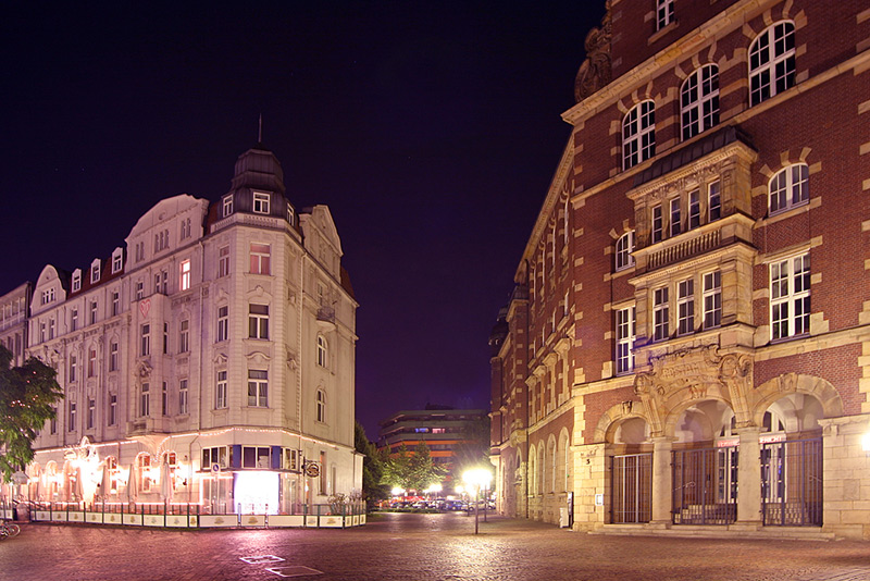 Gelsenkirchener Altstadt / Am Gelsenkirchener Bahnhofsvorplatz: links eine der wenigen erhaltenen Gründerzeitfassaden, rechts die unter Denkmalschutz stehende ehemalige Hauptpost, heute Sitz des Verwaltungsgerichts.